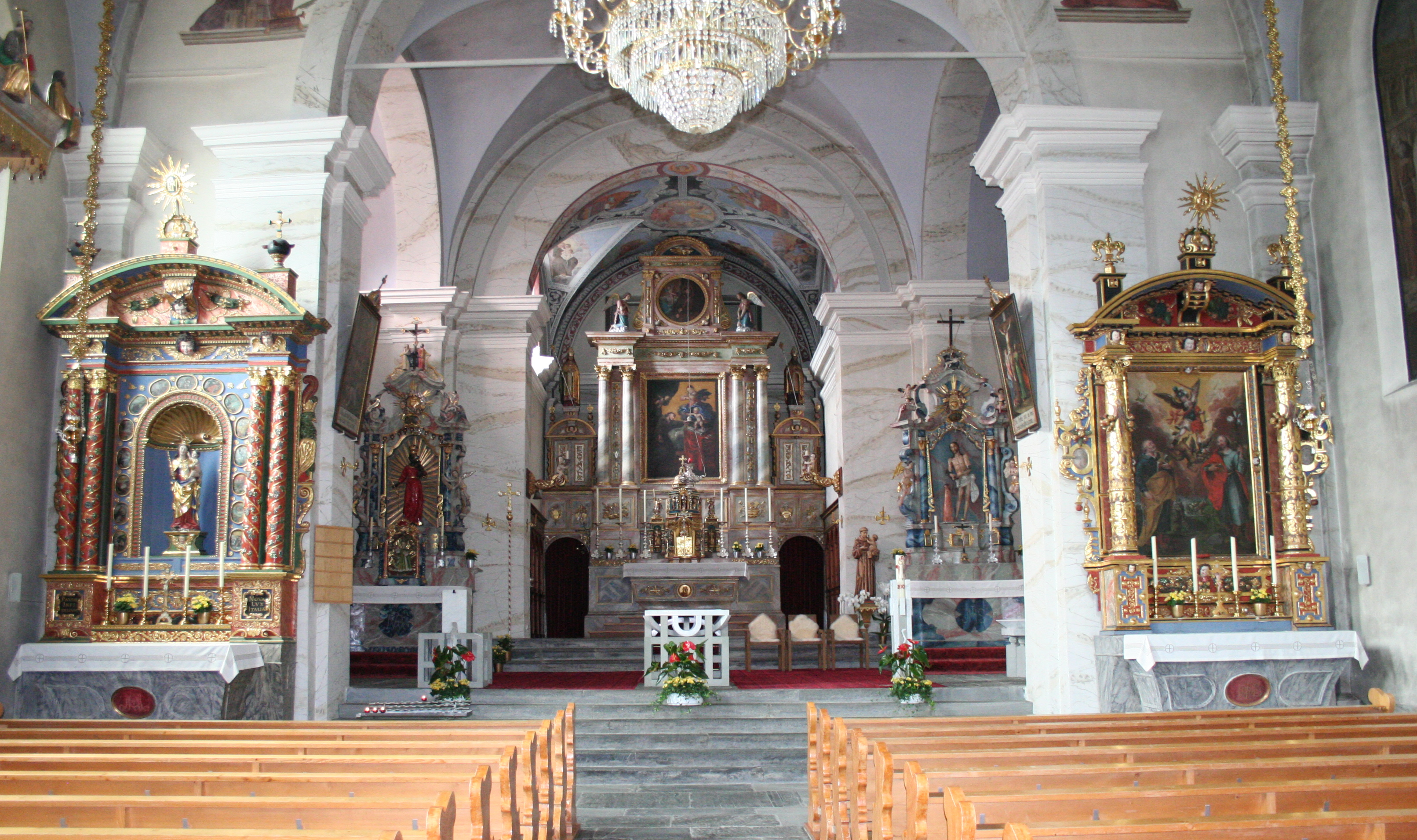 Antoniuskirche Lantsch/Lenz Chor